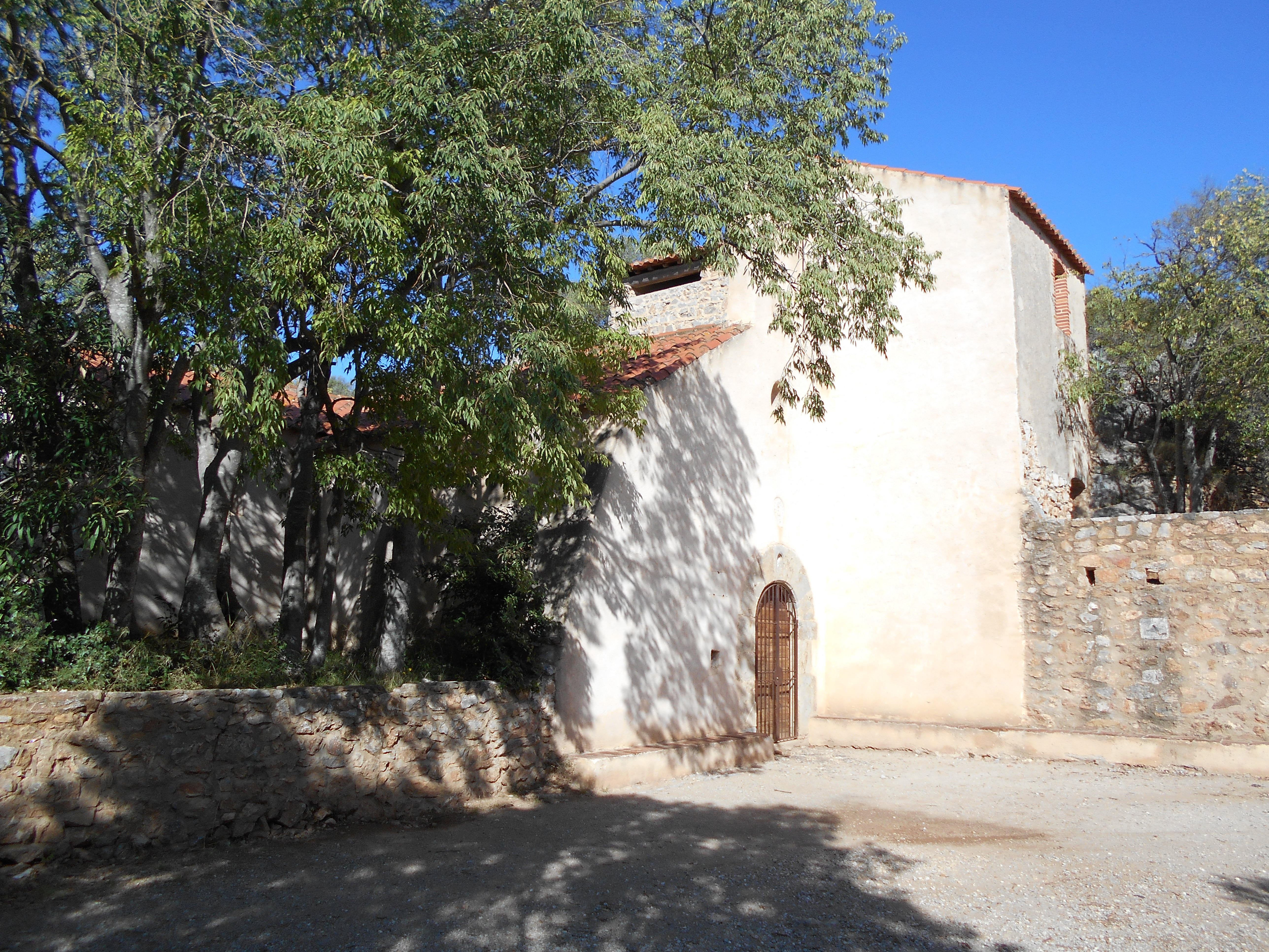 Sabtuari de Santa Caterina de Baixàs